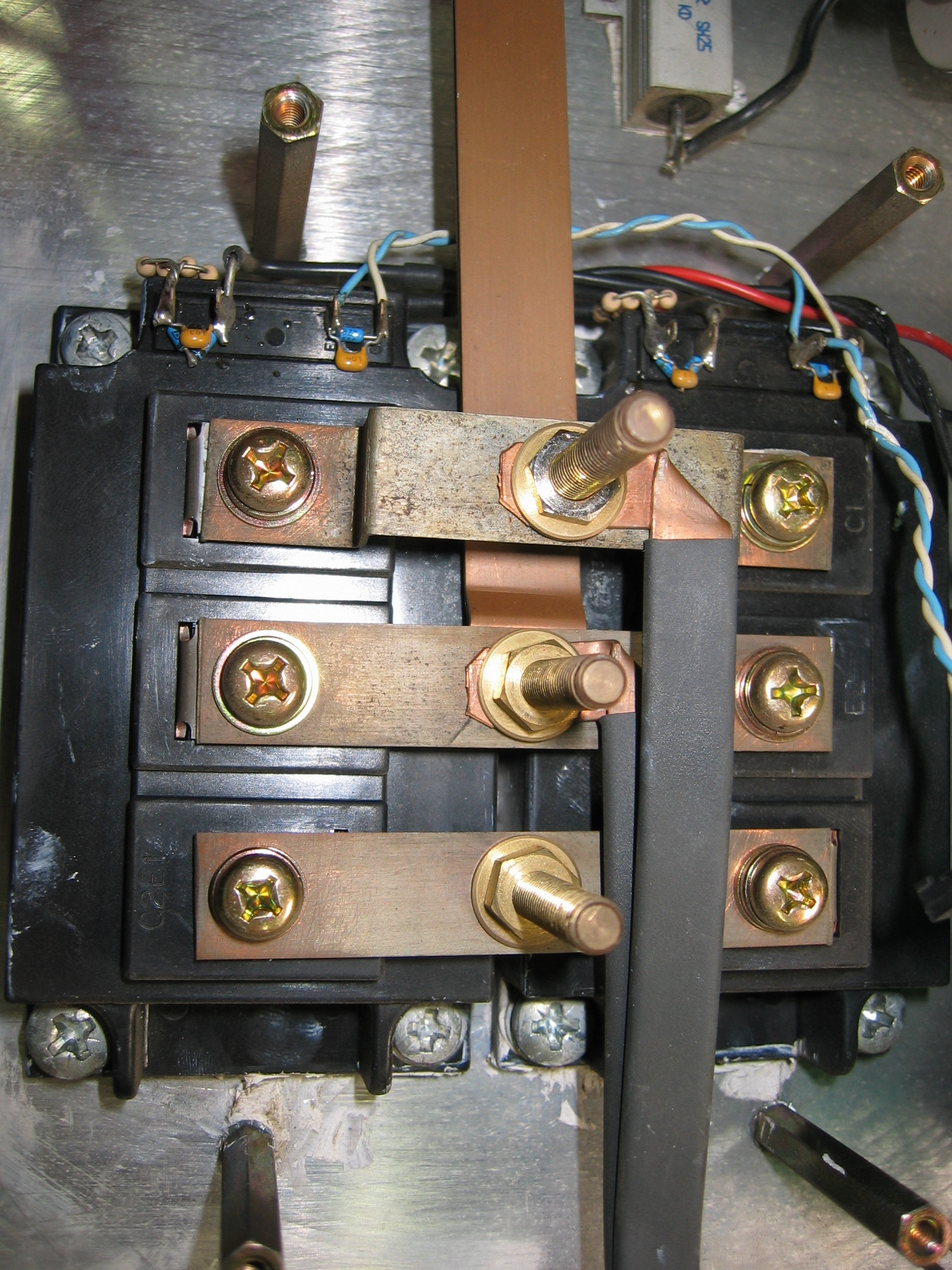 Étage de puissance PFC à IGBT, 20 kW 380 V DC, fréquence de commutation 25 kHZ, deux IGBT en parallèle.